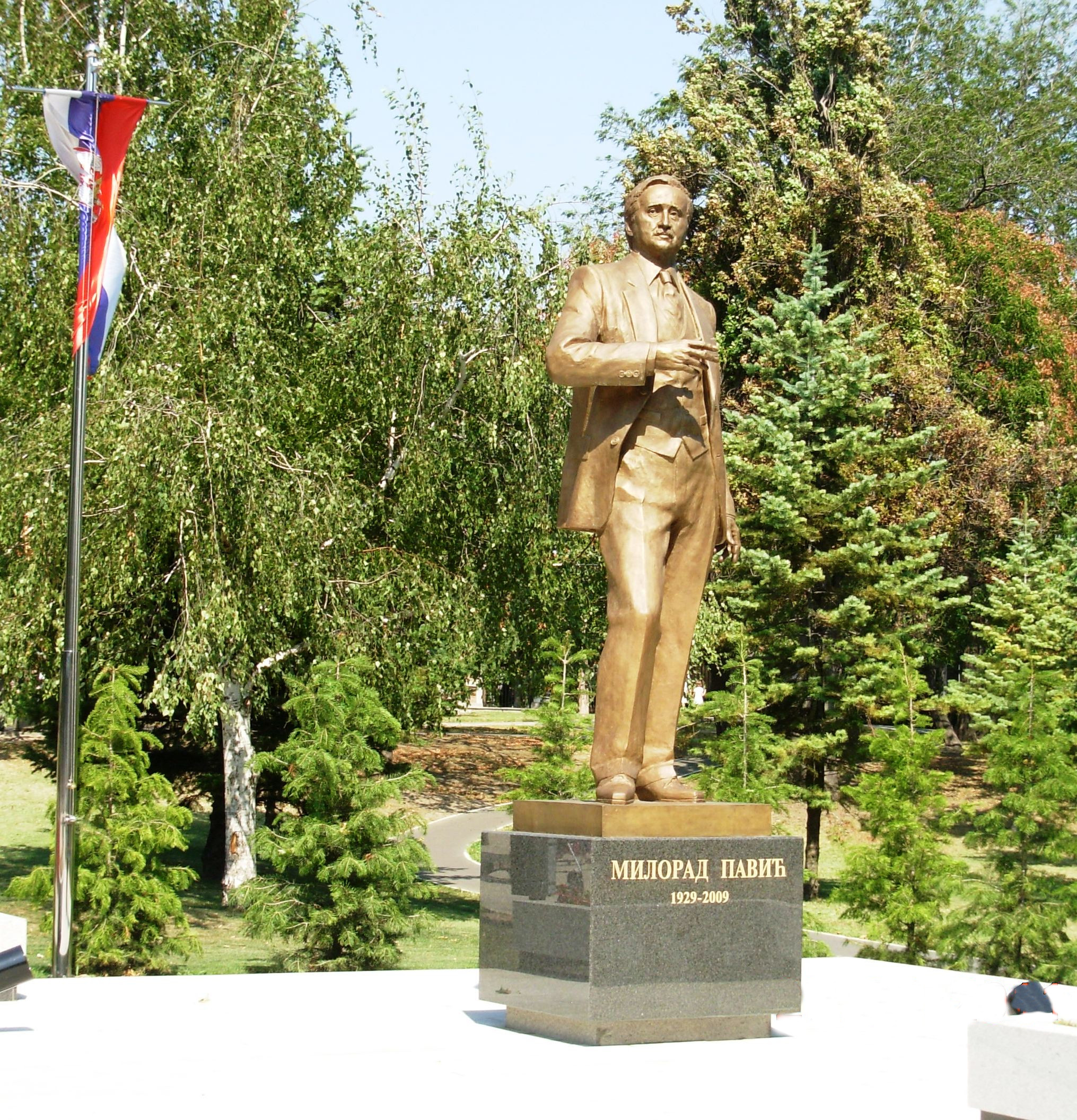 Milorad Pavić u tašmajdanskom parku u Beogradu. Slikao Goldfinger